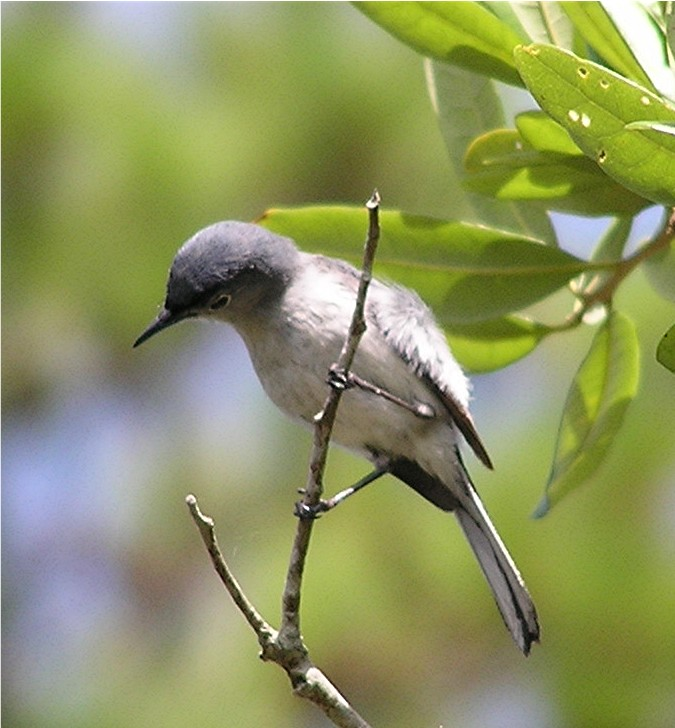 Blauwegrijze Muggenvanger (Polioptila caerulea) foto 2 eigen foto Categorie:Afbeelding vogel